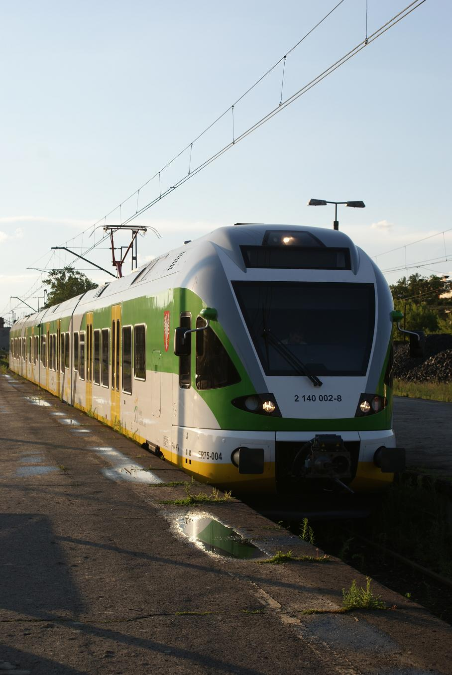 tabor Kolei Mazowieckich - model ER75 (Stadler Flirt) na stacji Otwock